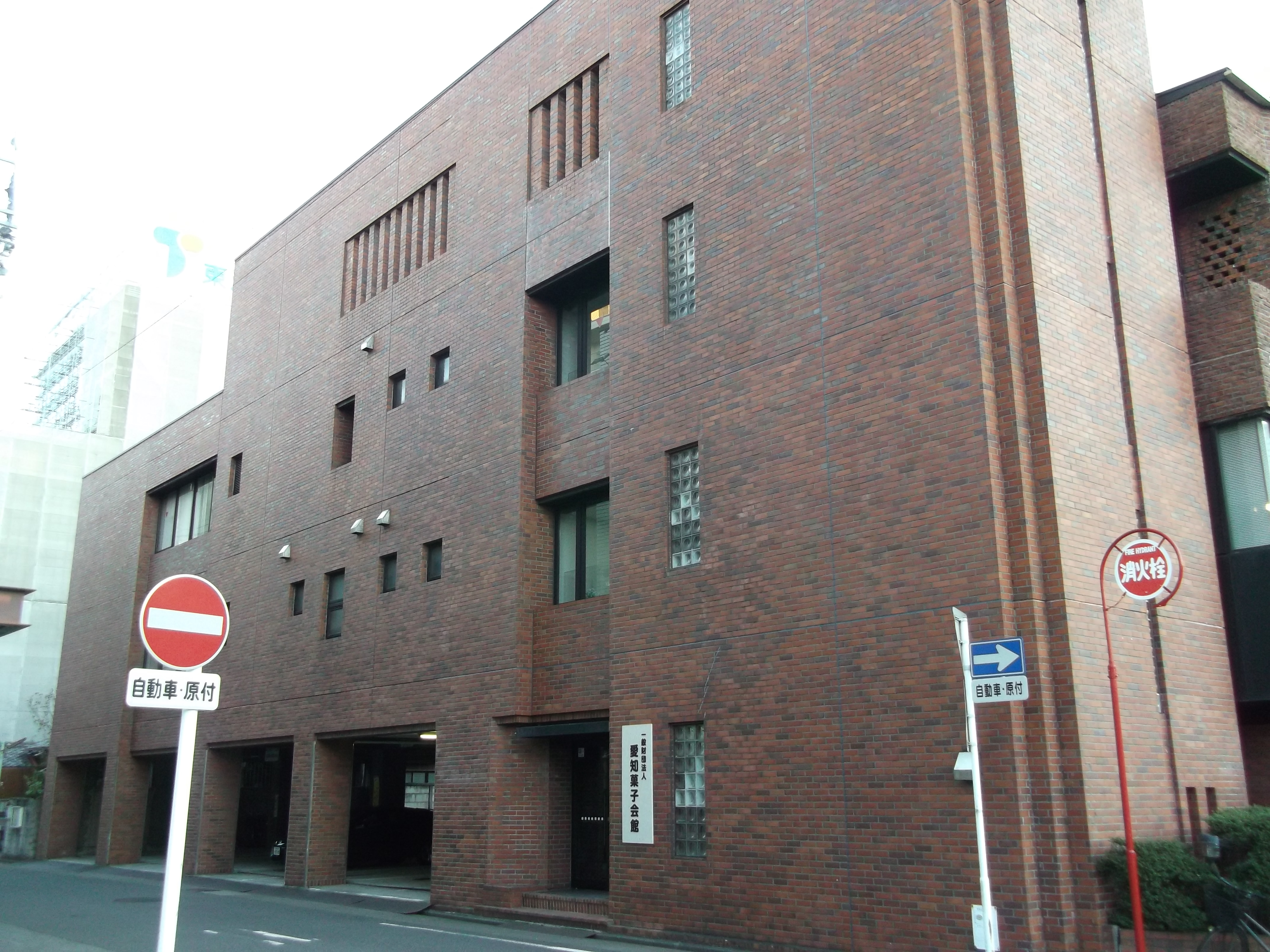 名古屋市西区新道にある愛知県菓業会館を北西角から写す。